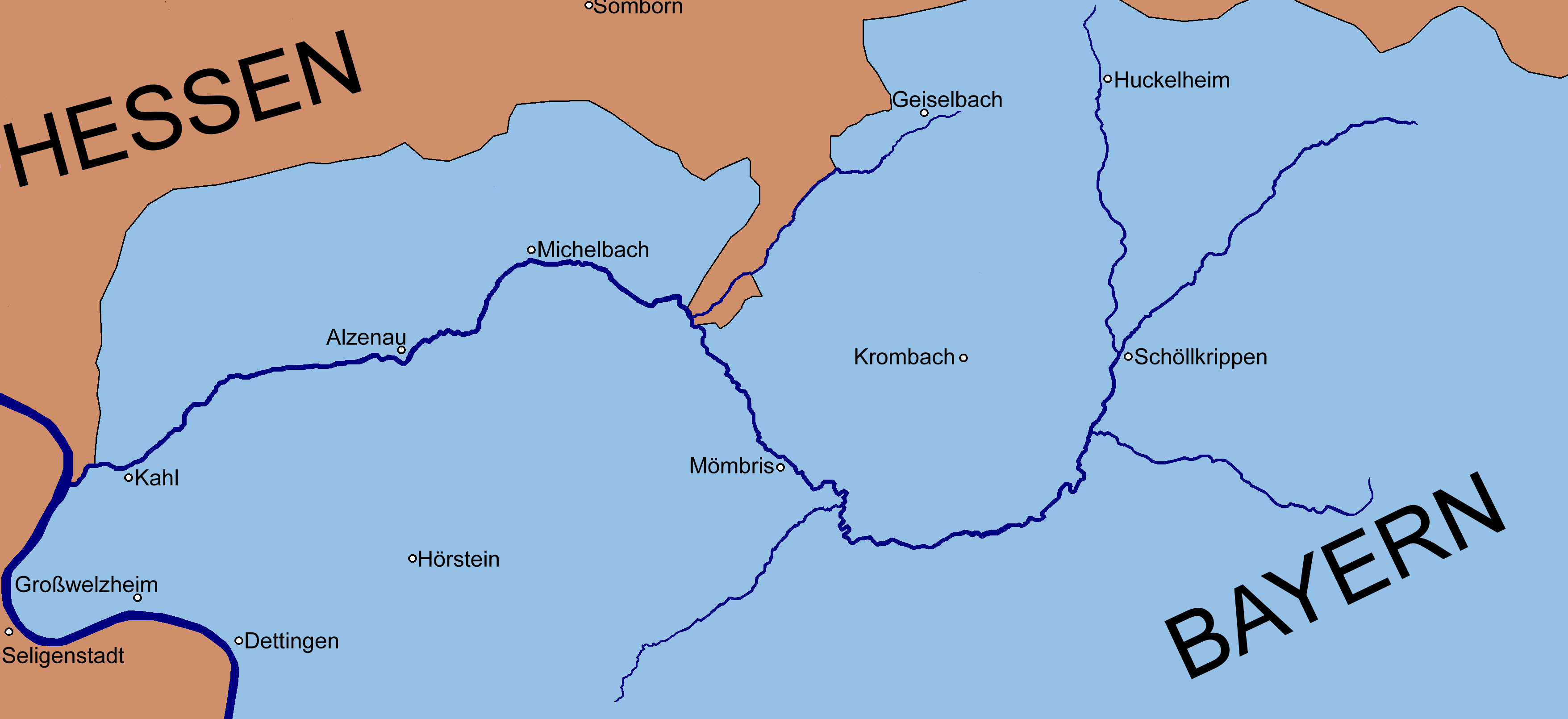 Die politische Zugehörigkeit des Kahlgrundes um 1950. Der Grenzverlauf der historischen Territorien kann stark abweichend dargestellt sein. Die Zugehörigkeit einiger Dörfer konnte nicht exakt nachgewiesen werden. Die Ortsnamen wurden in ihrer heutigen Namensform eingetragen.